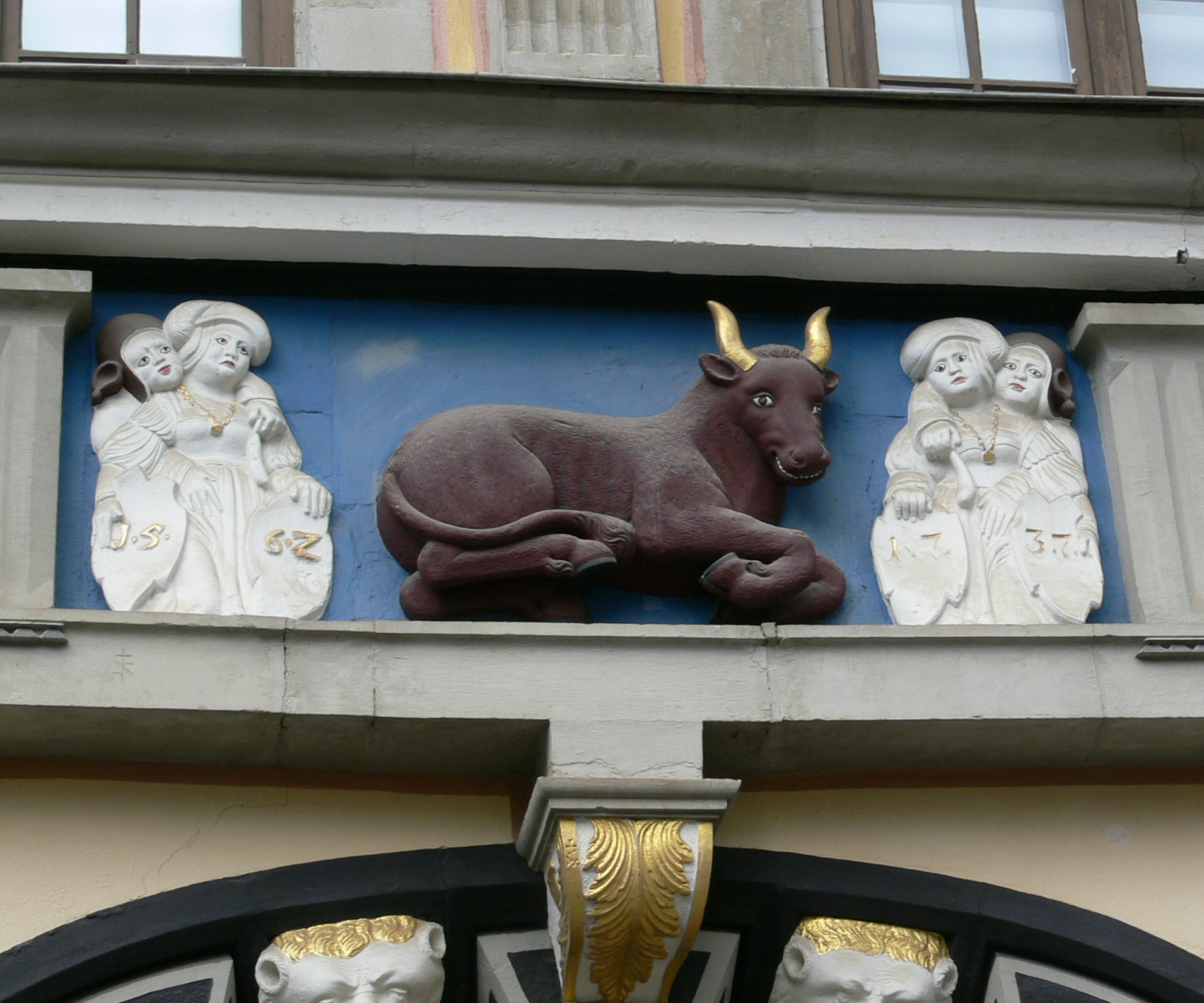 Roter Ochse (über dem Portal), Relief am Haus zum Roten Ochsen, Fischmarkt, Erfurt